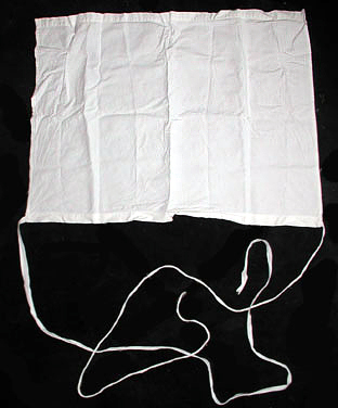 zelf gemaakt